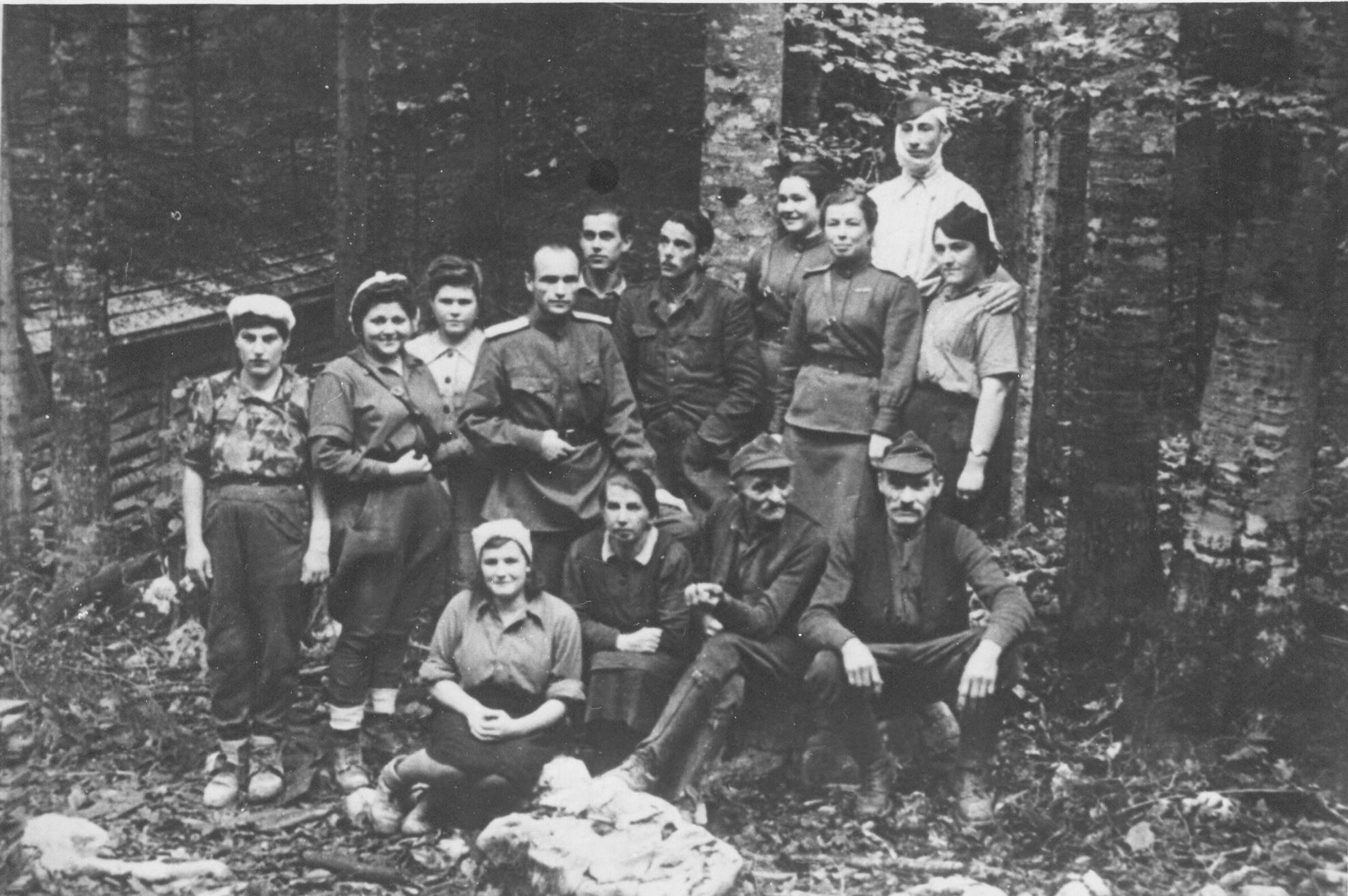 Osebje partizanske bolnišnice v kočevskih hribih.